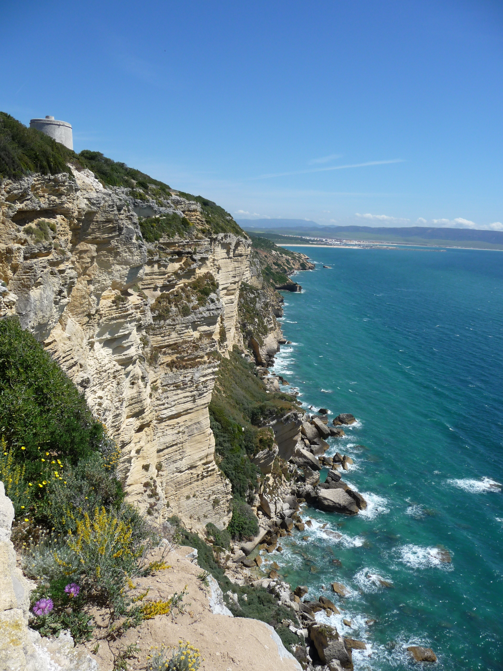 Torre del Tajo, Breña de Barbate.